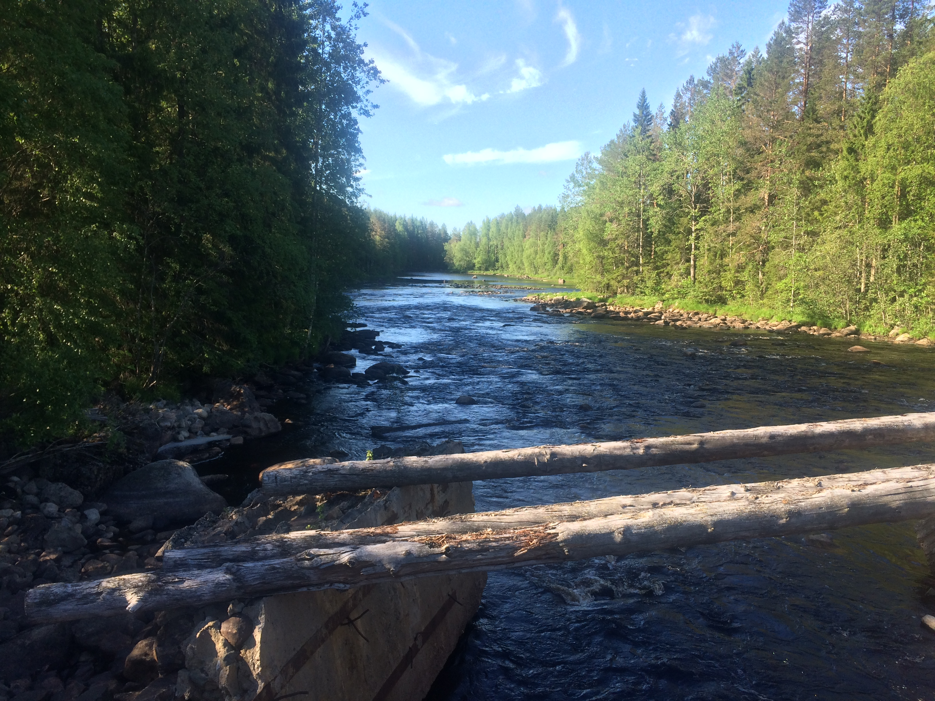 Тарасйоки